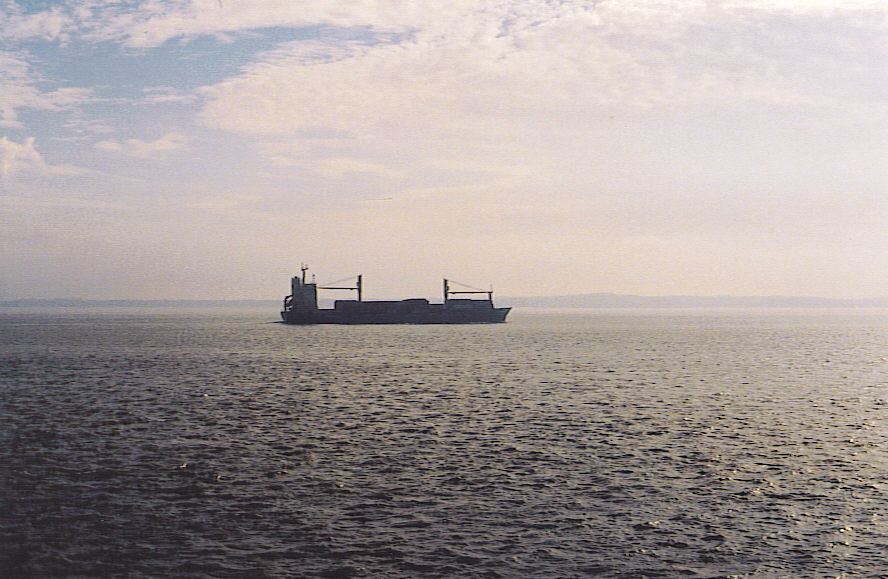 eigen foto - Cargoschip op de Gironde bij Royan